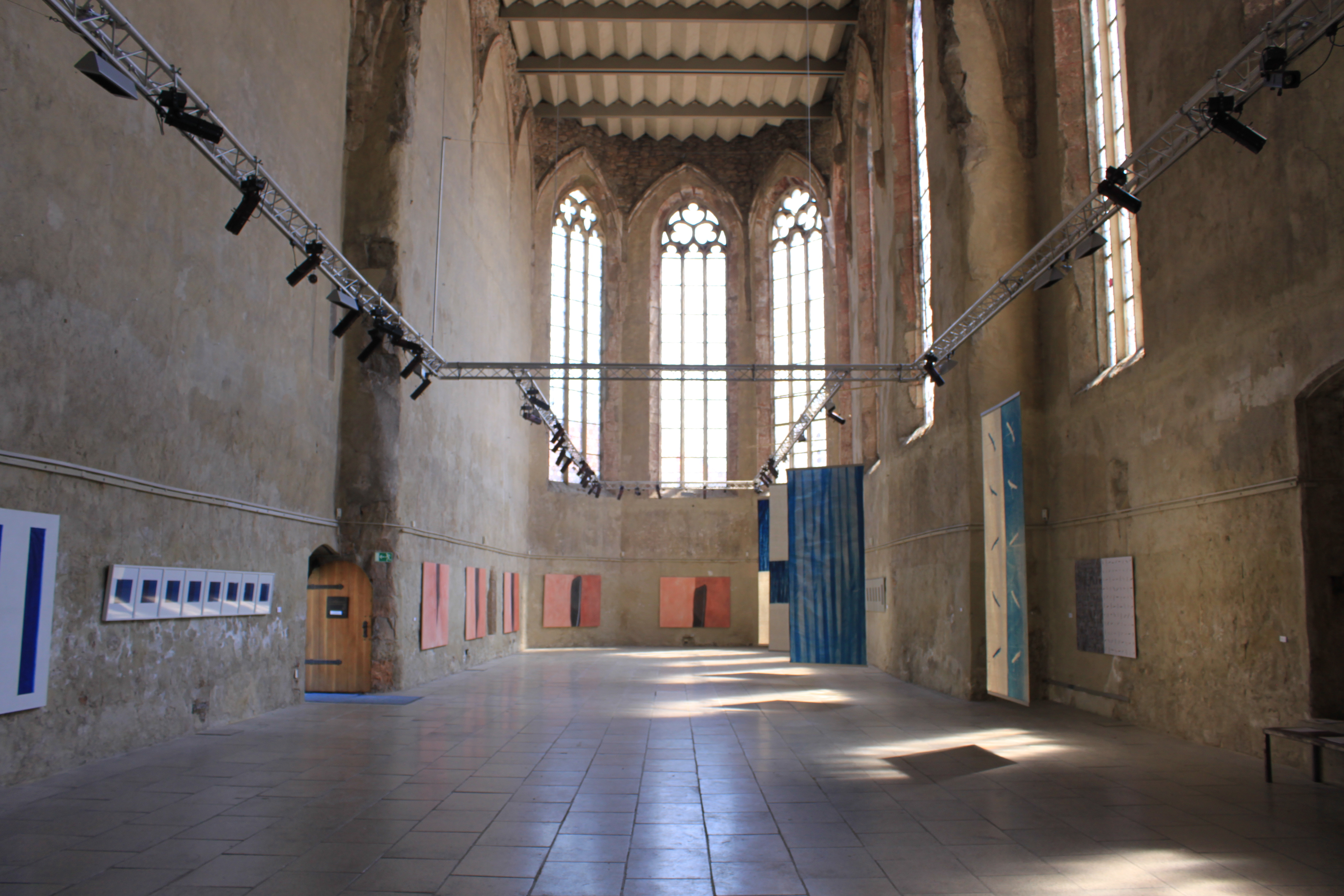 Ehemalige Dominikanerinnenkirche, Fotografstandpunkt in der Leibung des ehemaligen Hauptportals, mittig in der Hauptachse des Langhauses stehend, der Achsknick des Chores ist erkennbar, auch an der Beleuchtungskonstruktion, welche ohne Achsknick in der Achse des Langhauses in den Chor wenn auch als kleineres Trapez fortläuft. Ausstellung: Gerlinde Thuma: 8. Mai bis 7. Juni 2015